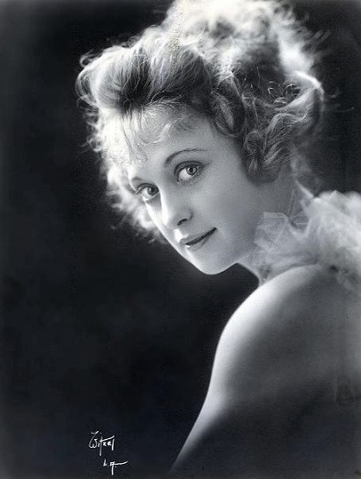 Jackie Saunders